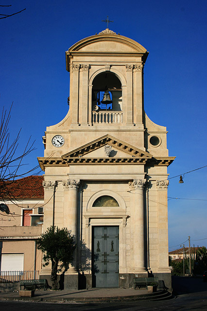 La chiesa di Altarello dedicata alla Madonna di Porto Salvo.